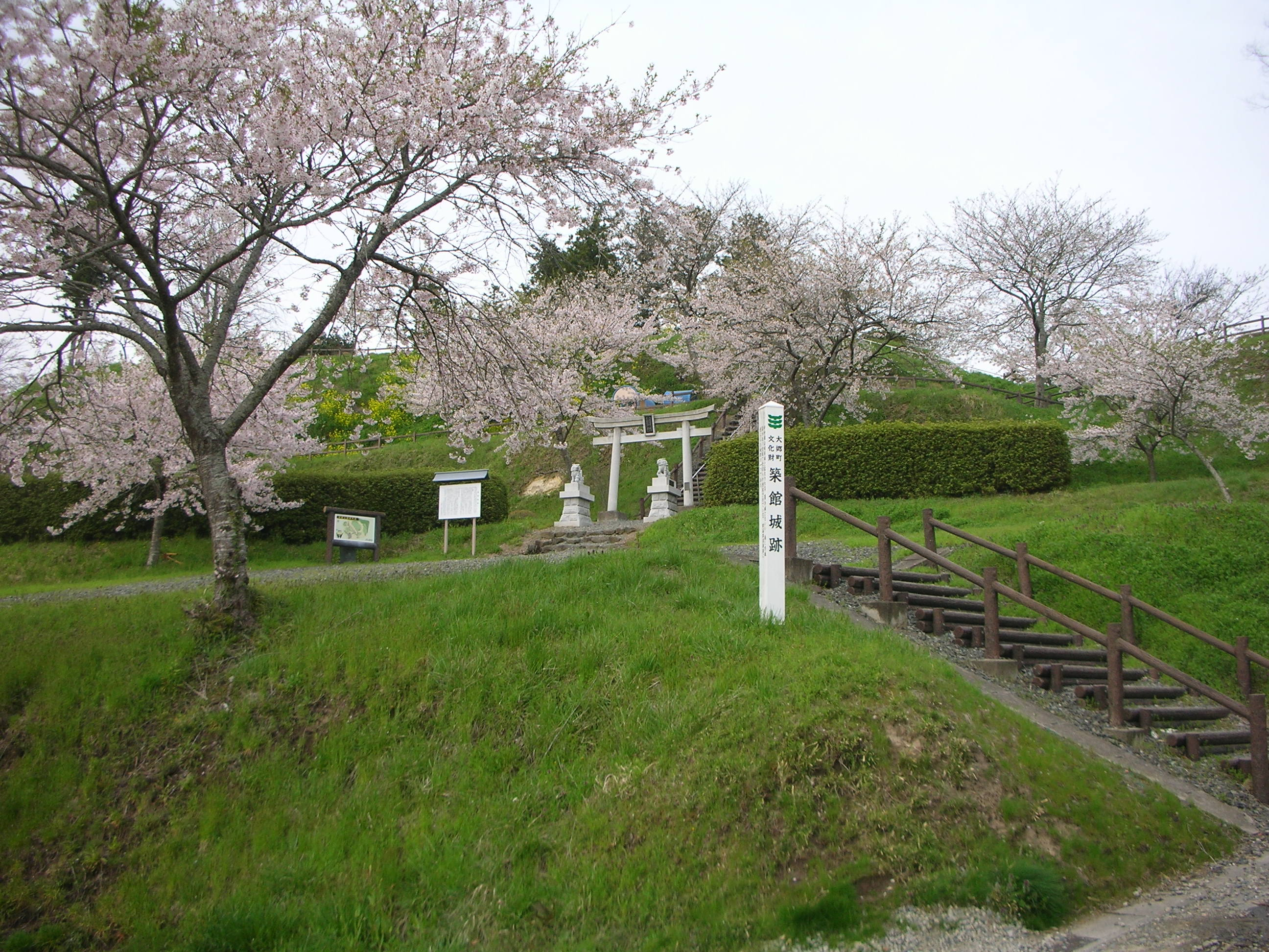 築館城址の公園